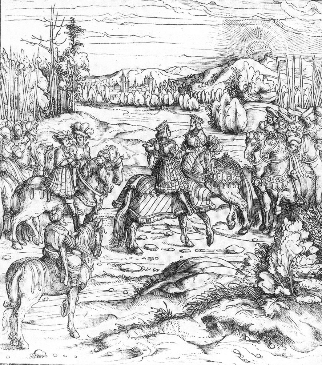 Kaiser Friedrich III. und Herzog Karl von Burgund - Treffen in Trier 1473. Hier wurde erstmals über eine Heirat mit Maria von Burgund gesprochen. Holzschnitt aus dem "Weiß Kunig"